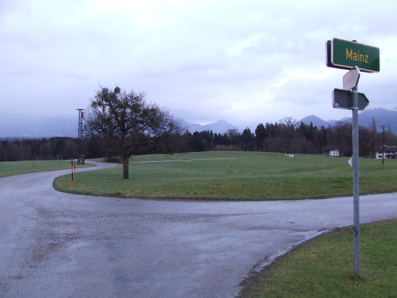 Weiler Mainz bei Bad Aibling.